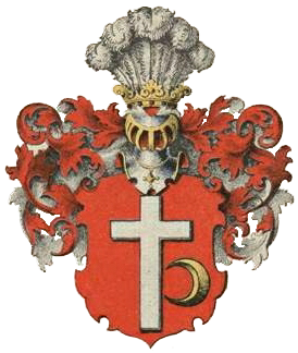 Bistrami suguvõsa vabahärravapp